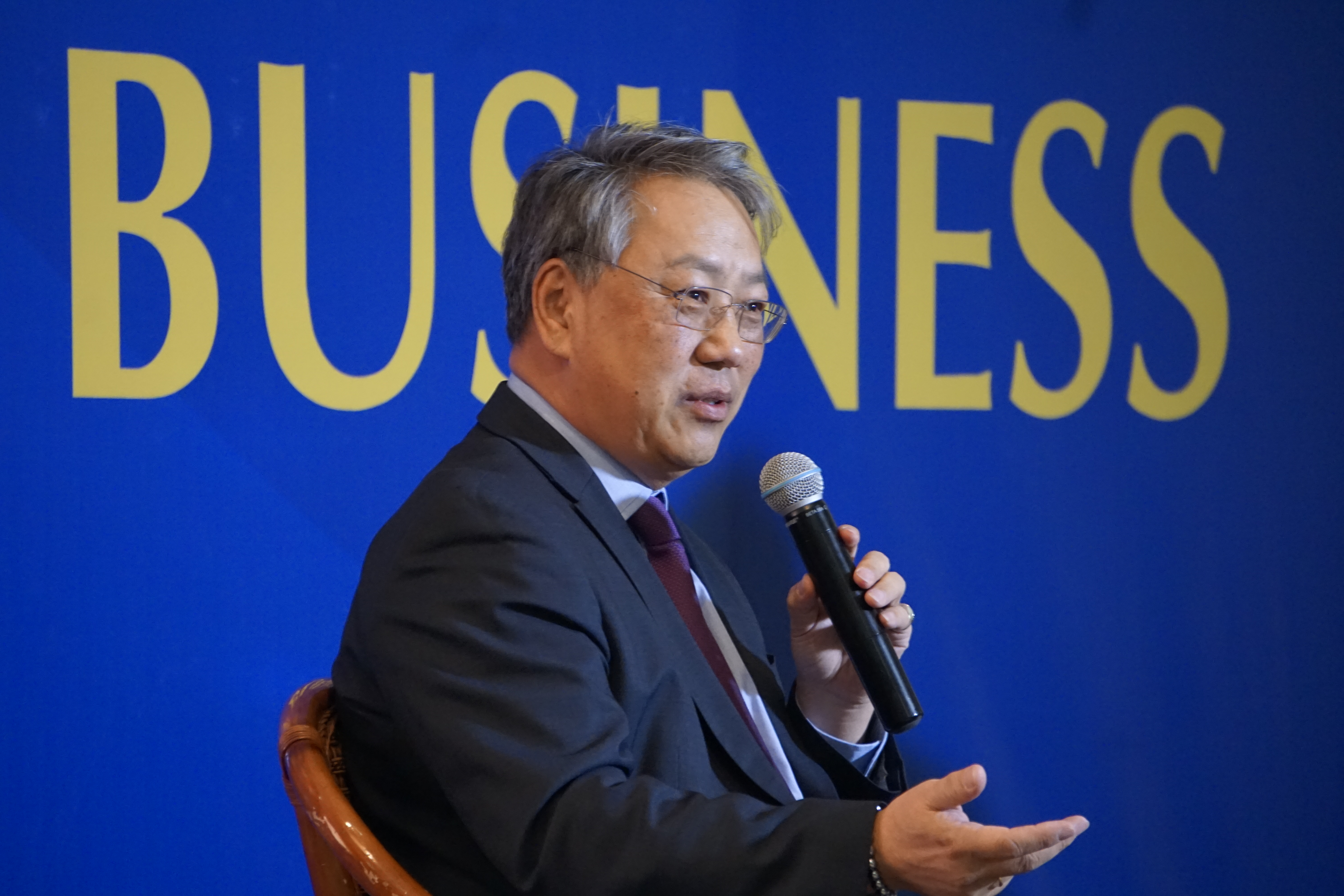 Монгол: Монгол улсын 21 дэх ерөнхий сайд Р.Амаржаргал Voice of Business уулзалтанд оролцов